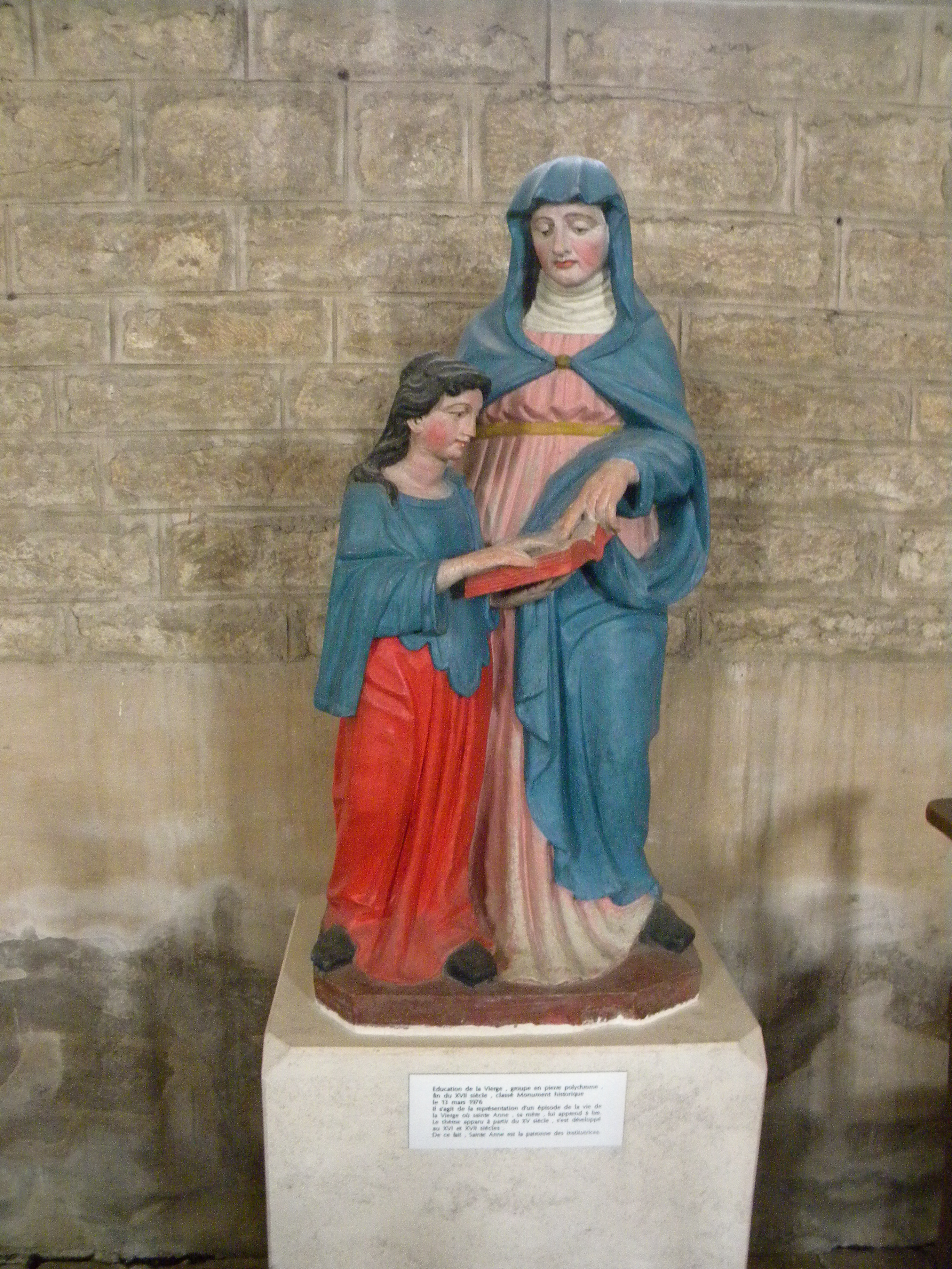 Sankta Anna kaj Maria en la Preĝejo Sankta Marteno